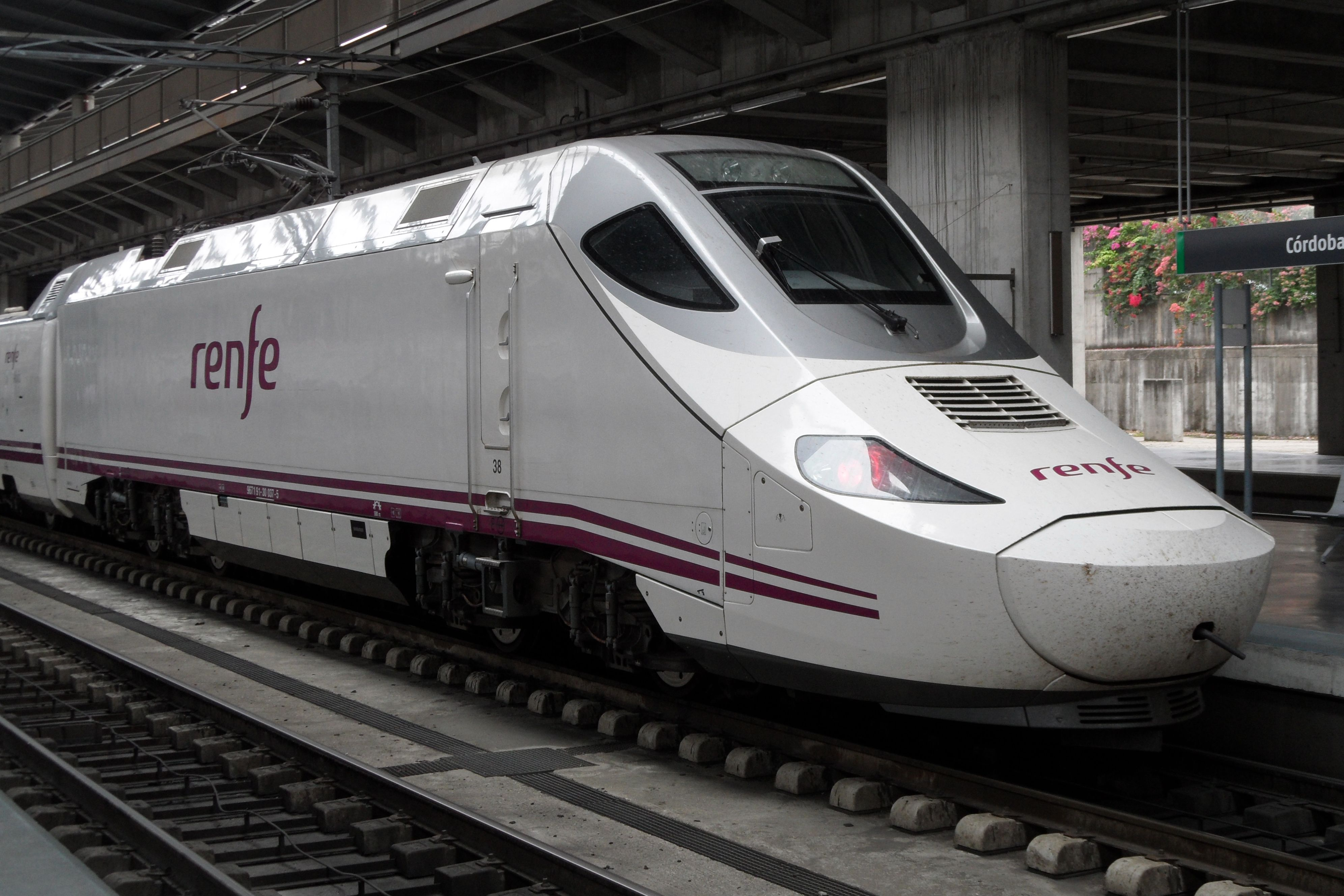 Umspurbarer, zweisystemfähiger Triebkopf für angepasste Talgo-7-Einheiten. Trotz der ET-Baureihennummer 130 sind die Triebköpfe als Wagen beschriftet.